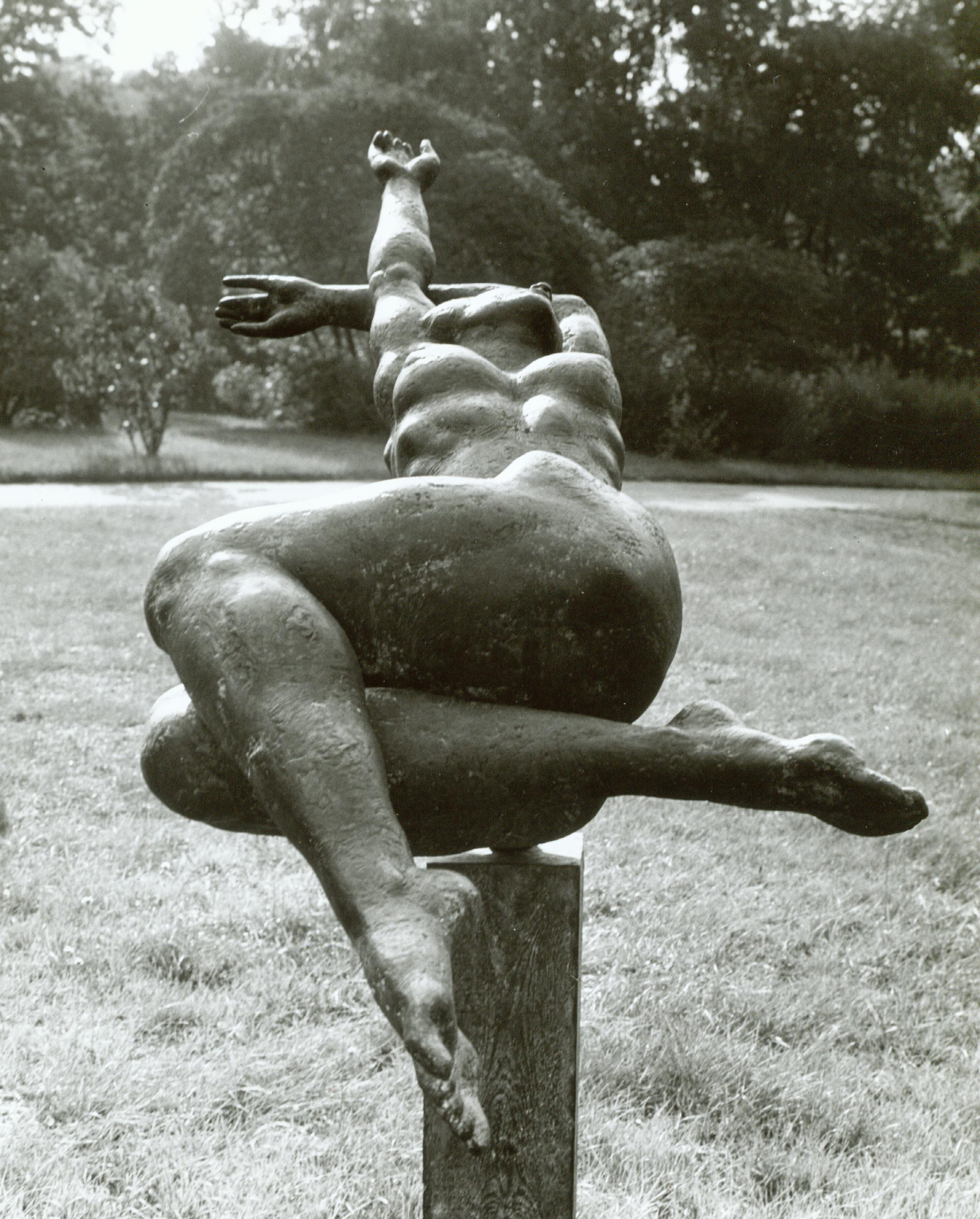 Bronze, Länge 271cm